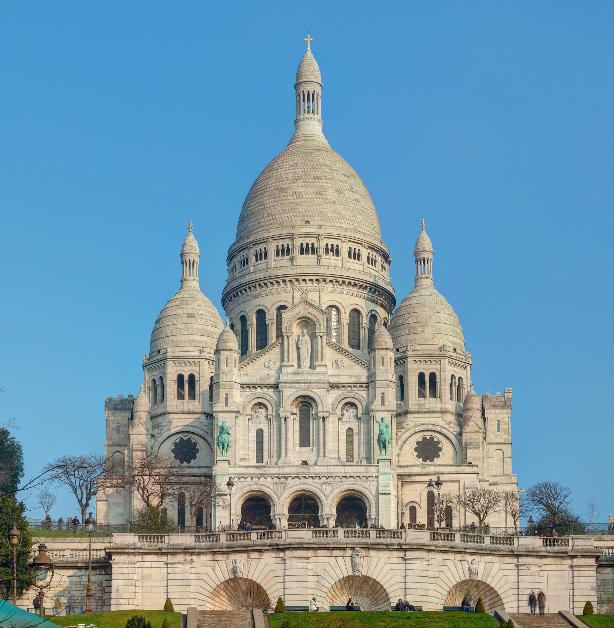 Basilique du Sacré-Cœur de Montmartre, à Paris.